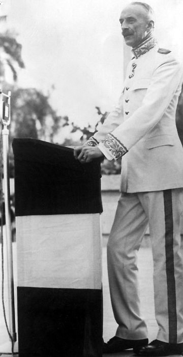 Repronegatief. Gouverneur-Generaal Jhr. Mr. B.C. de Jonge tijdens een toespraak